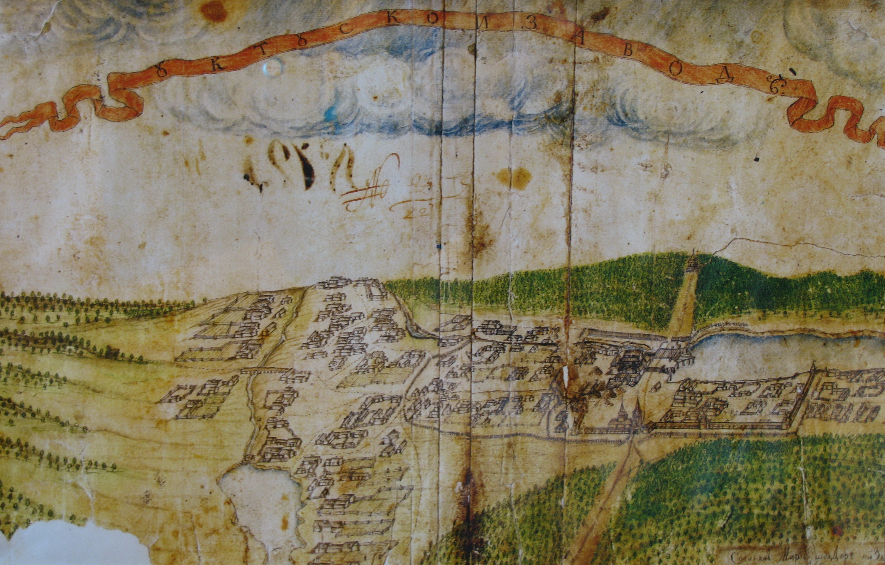 Рисунок Уктусского завода